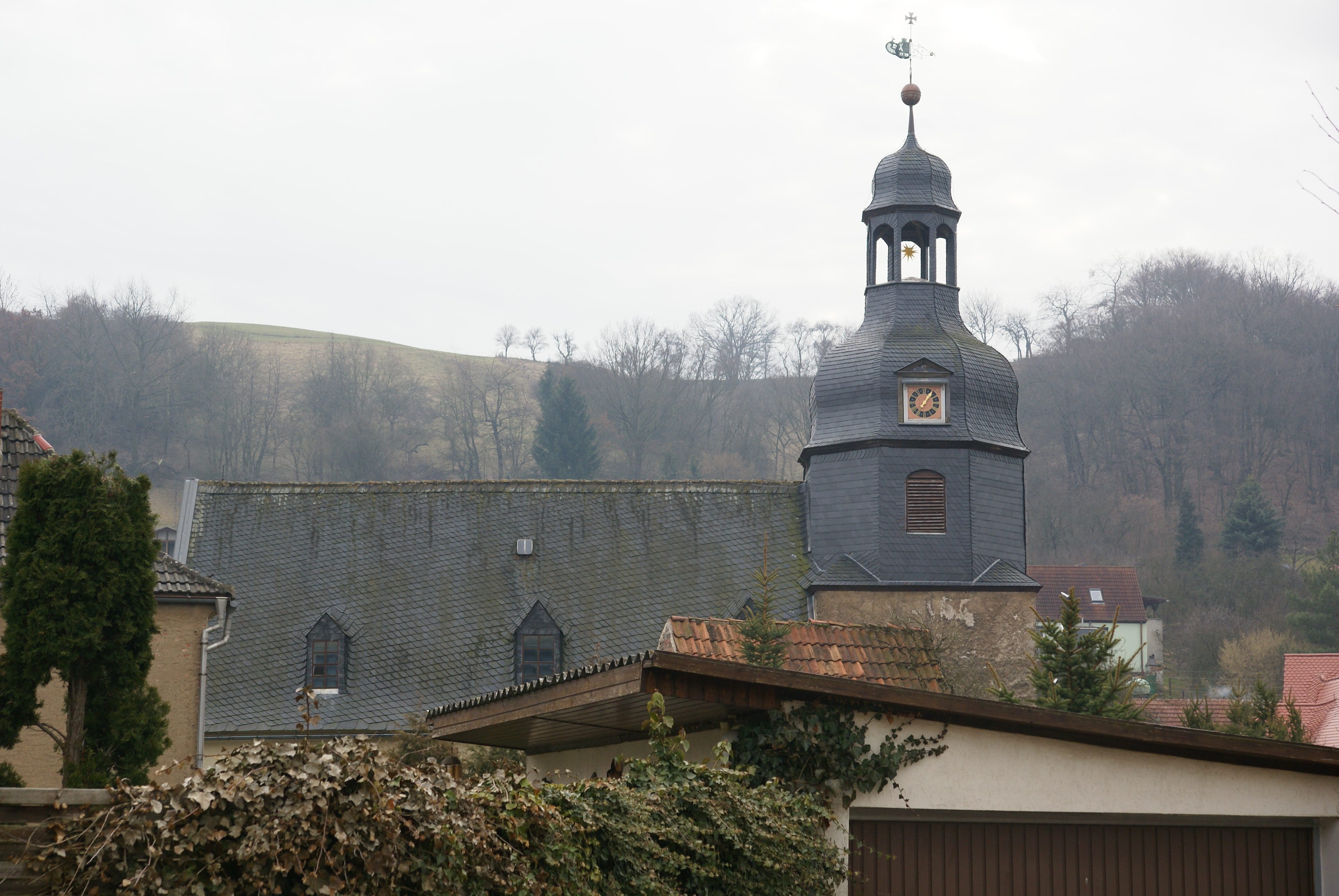 die Dorfkirche von Pölsfeld